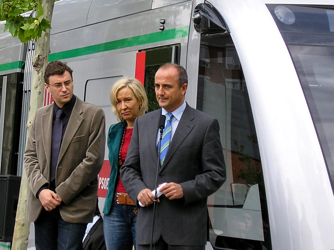 Presentación de la propuesta de instalación de un tranvía en Vallecas.